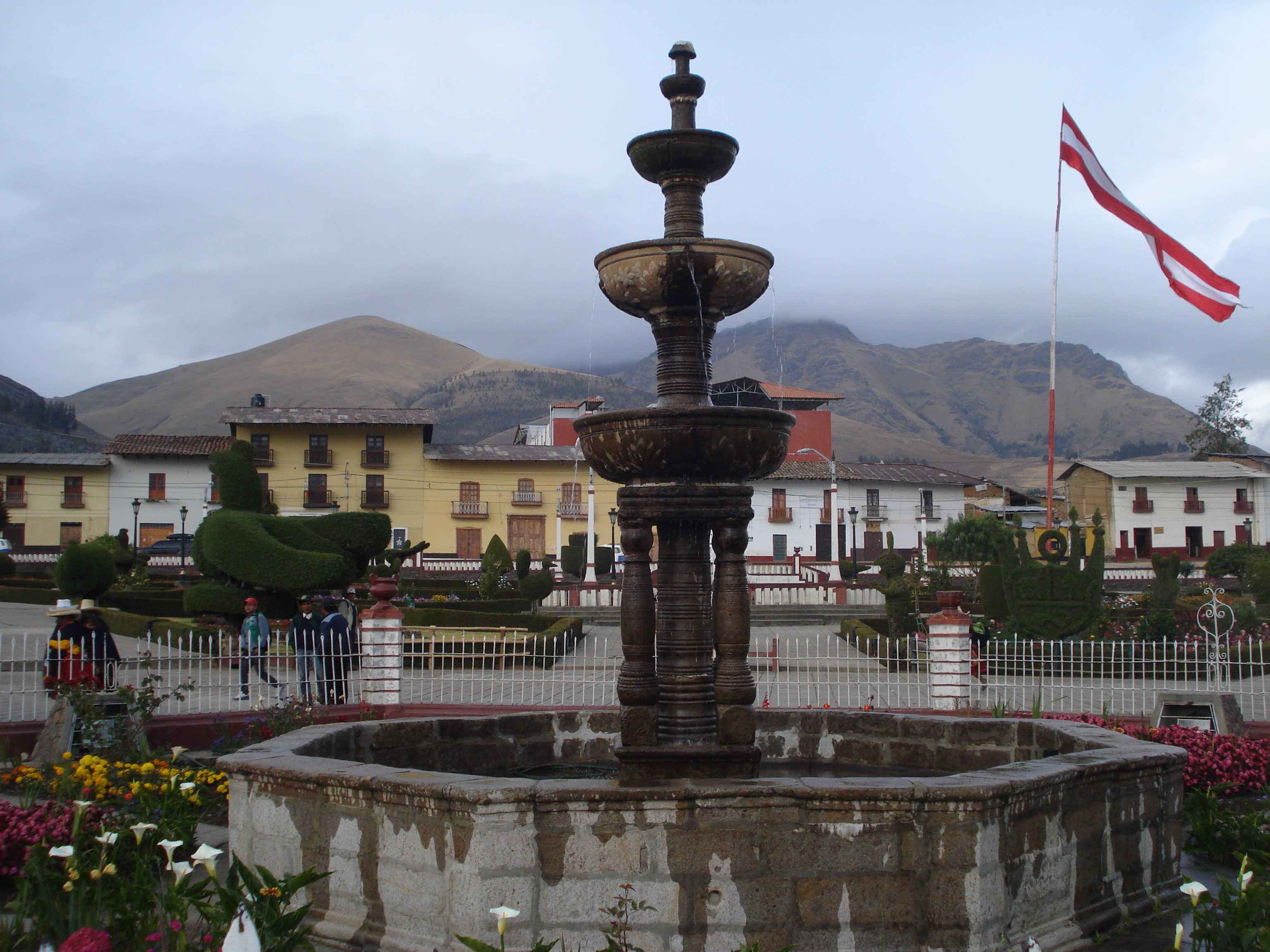 Pileta de la Plaza de Armas de la ciudad peruana de Huamachuco.